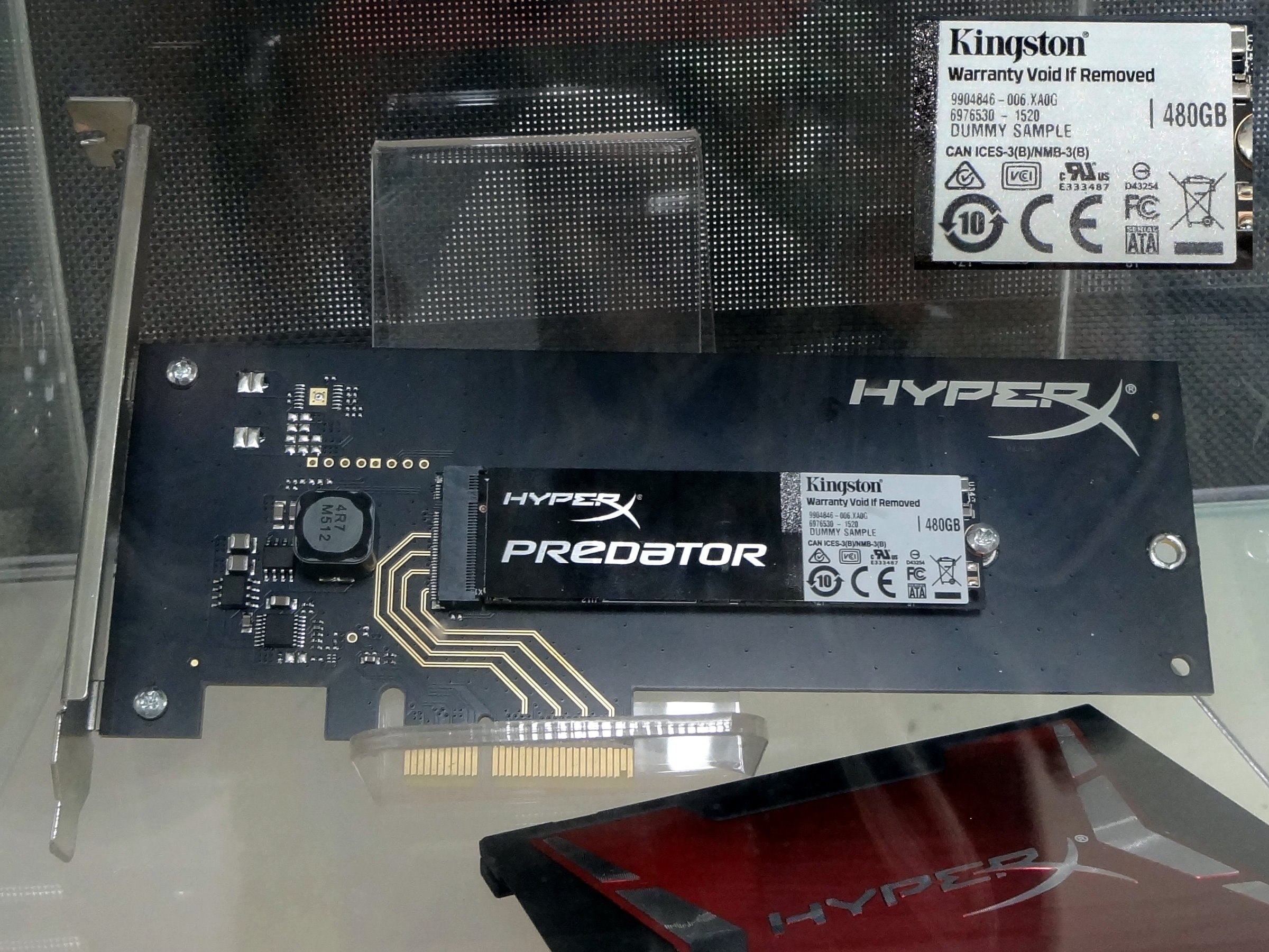 光華數位新天地六樓金士頓科技授權換修中心，金士頓科技PCIe固態硬碟HyperX Predator 480GB樣品。